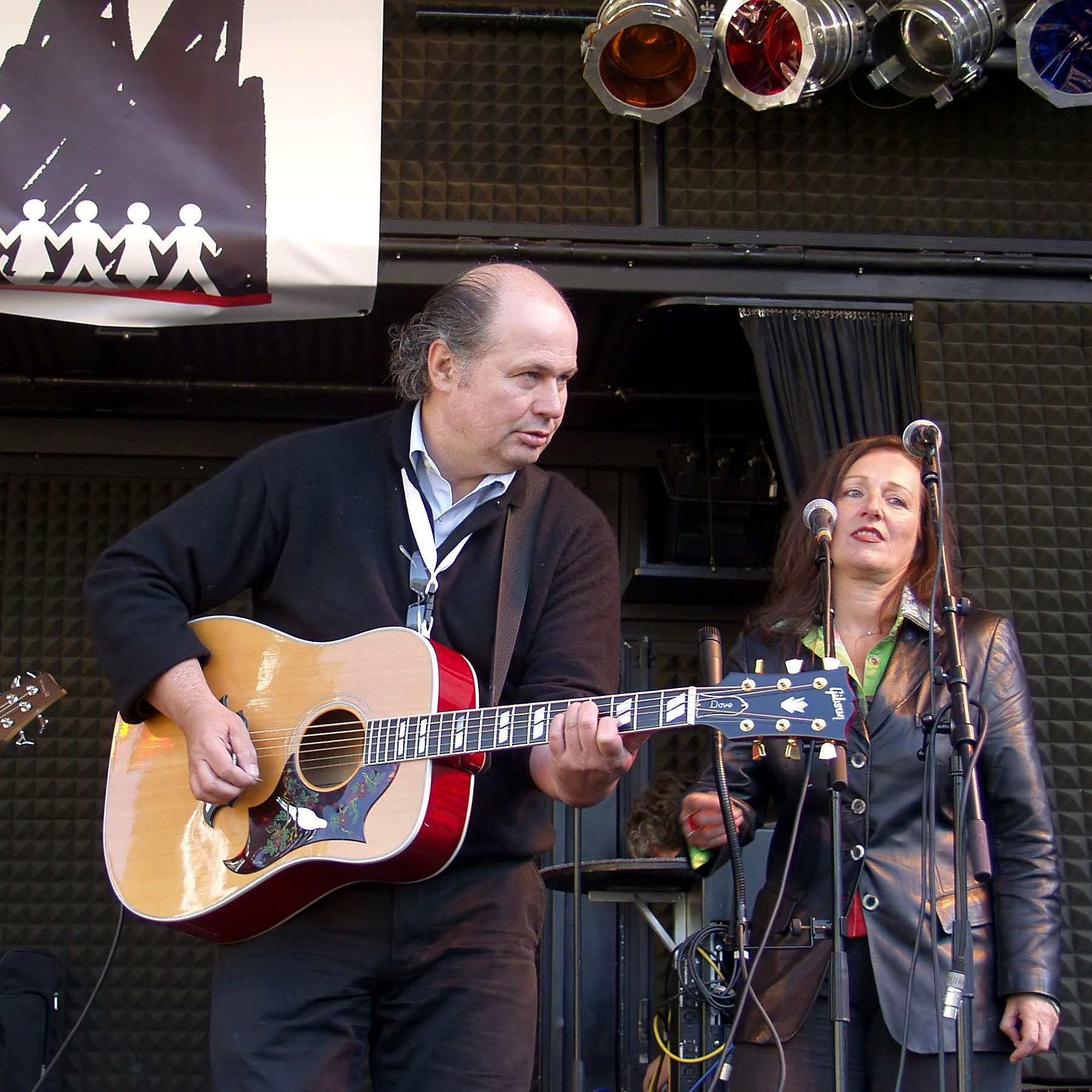 Arno Steffen auf der politischen Demonstration „Köln stellt sich quer“ gegen den so genannten „Anti-Islamisierungskongress“ der rechtsgerichteten Partei „Pro Köln“ auf dem Roncalliplatz in Köln.